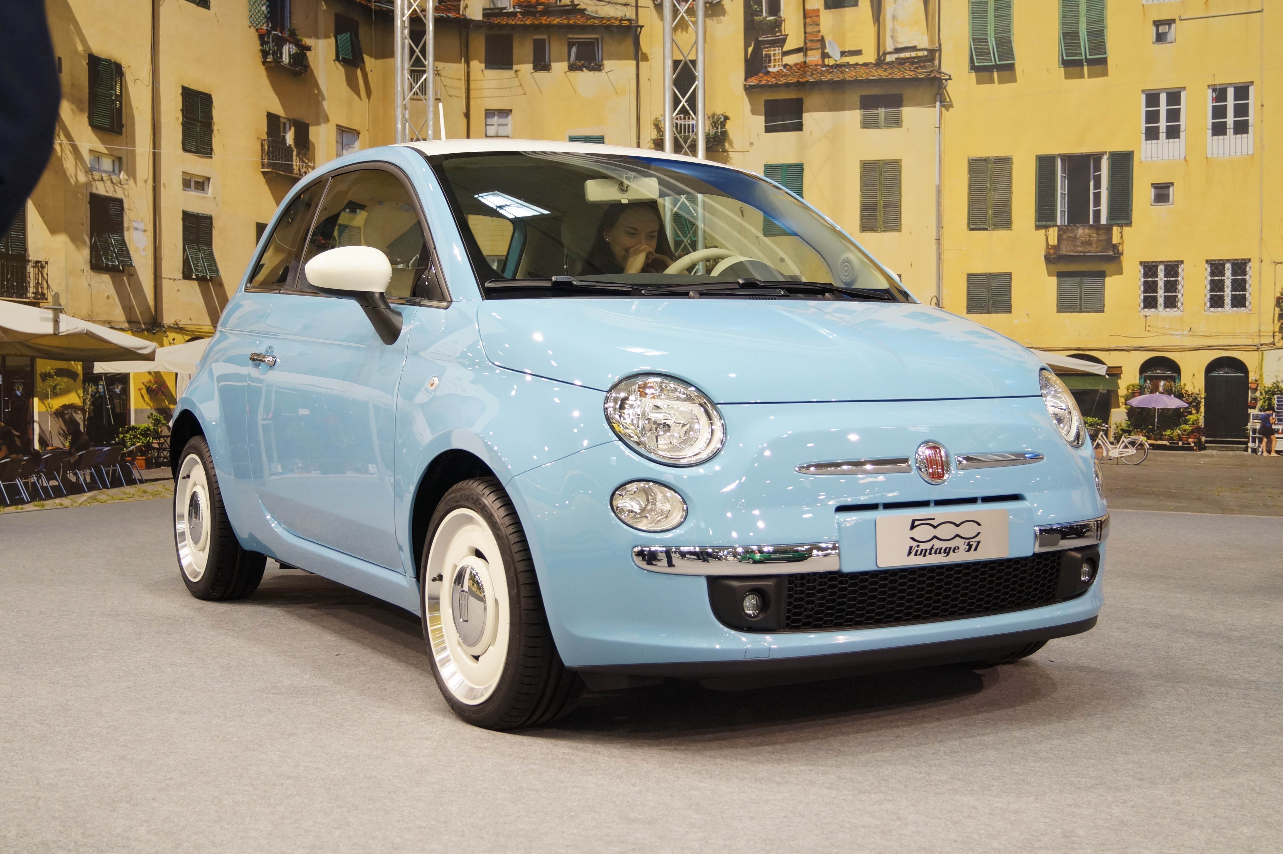 The making of this document was supported by Wikimedia Polska Association, within Wikigrant no. WG 2015-19. English | polski | +/− Przód FIATA 500, edycji limitowanej Vintage '57 na Motor Show Poznań 2015